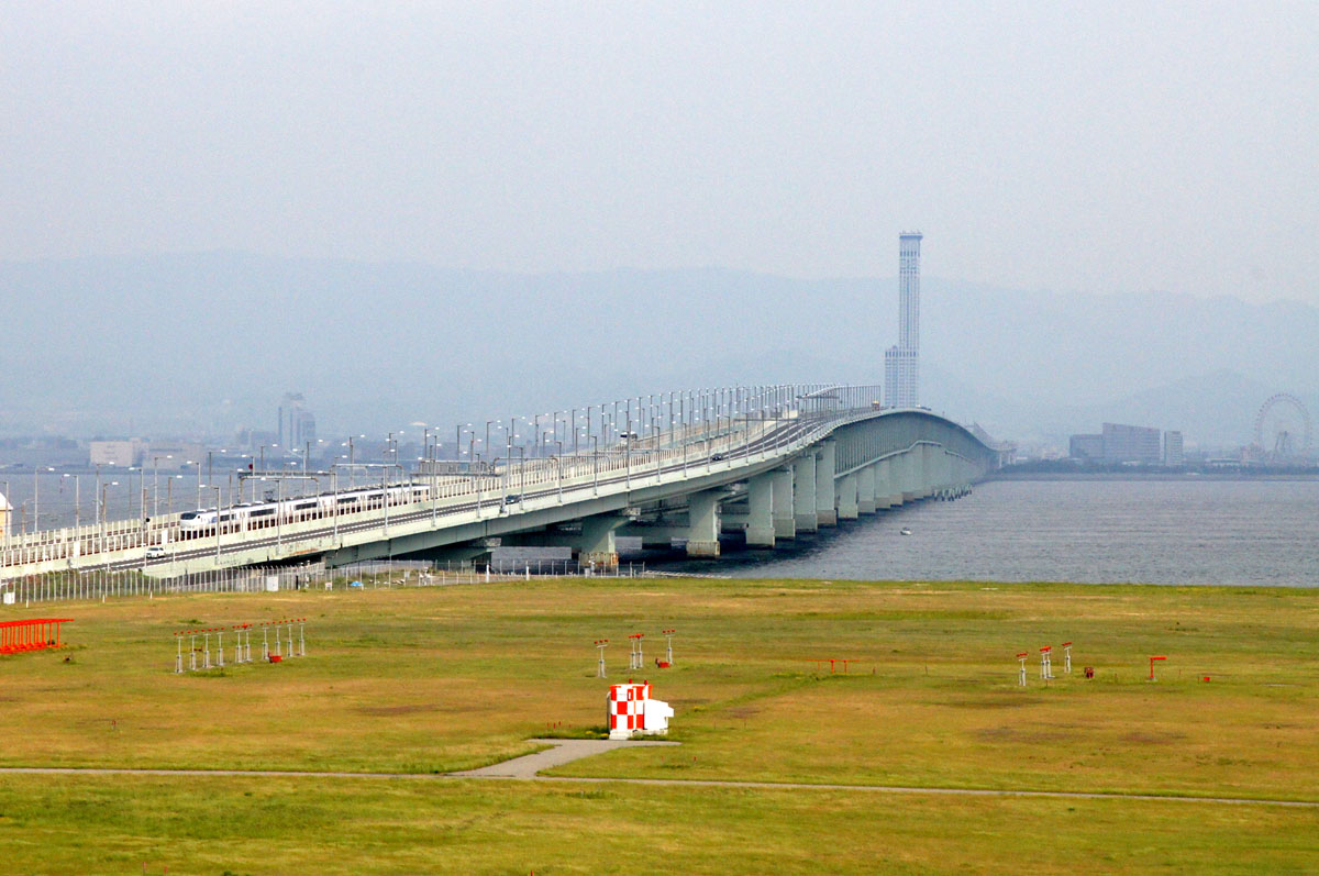 関西空港をあとにする特急「はるか」